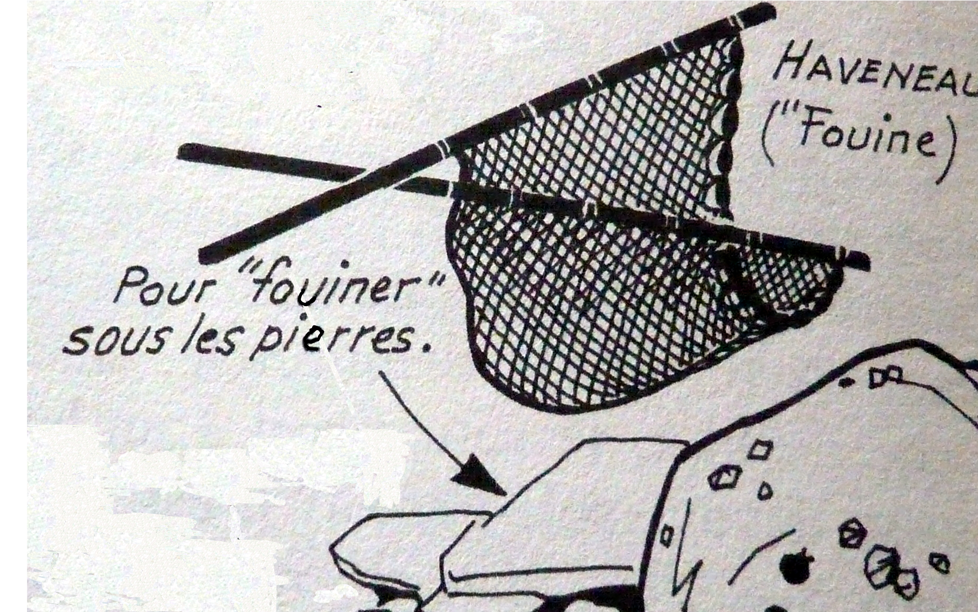 Le principe de la fouine utilisé, notamment, en Haute-Normandie